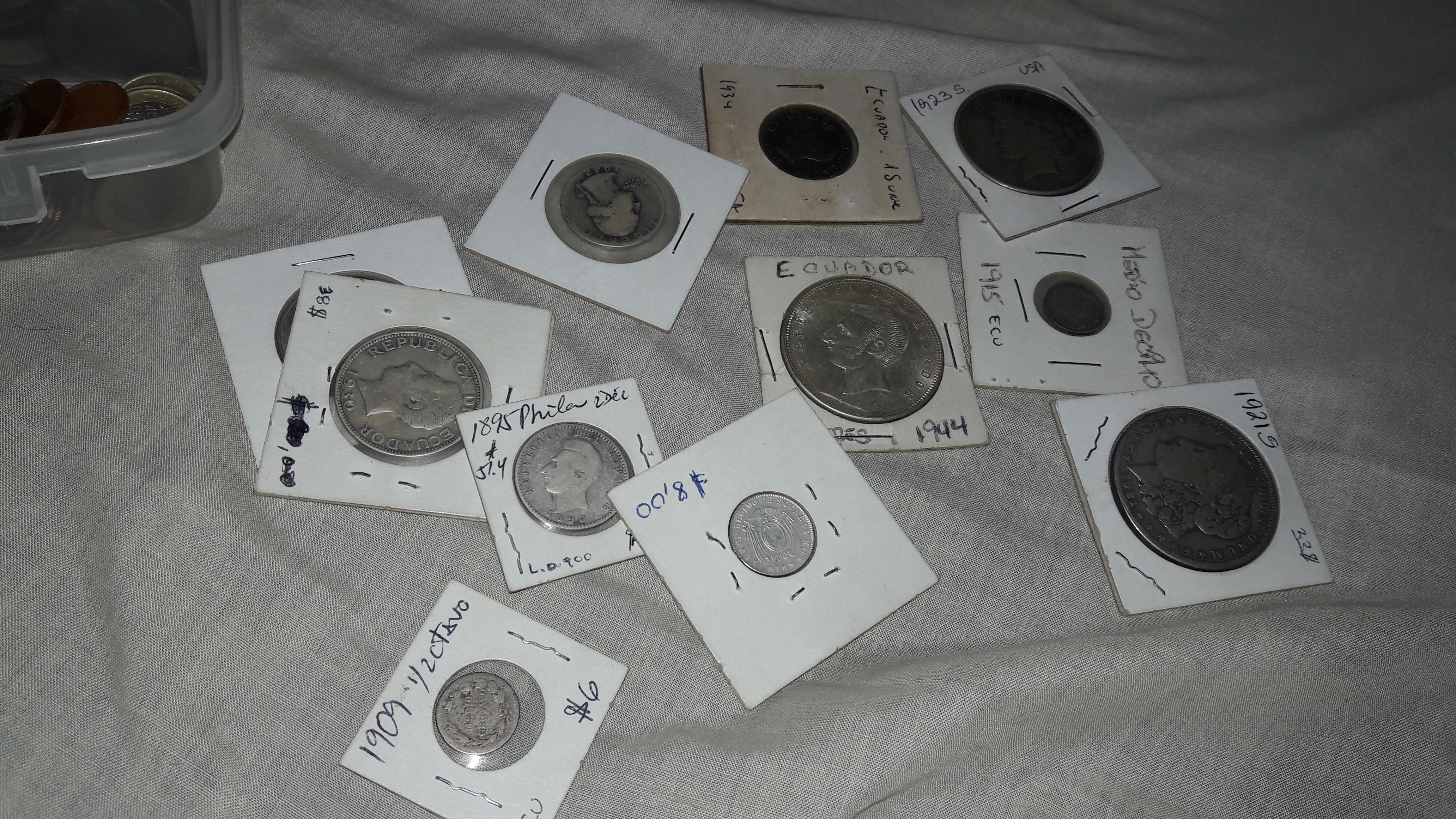 monedas